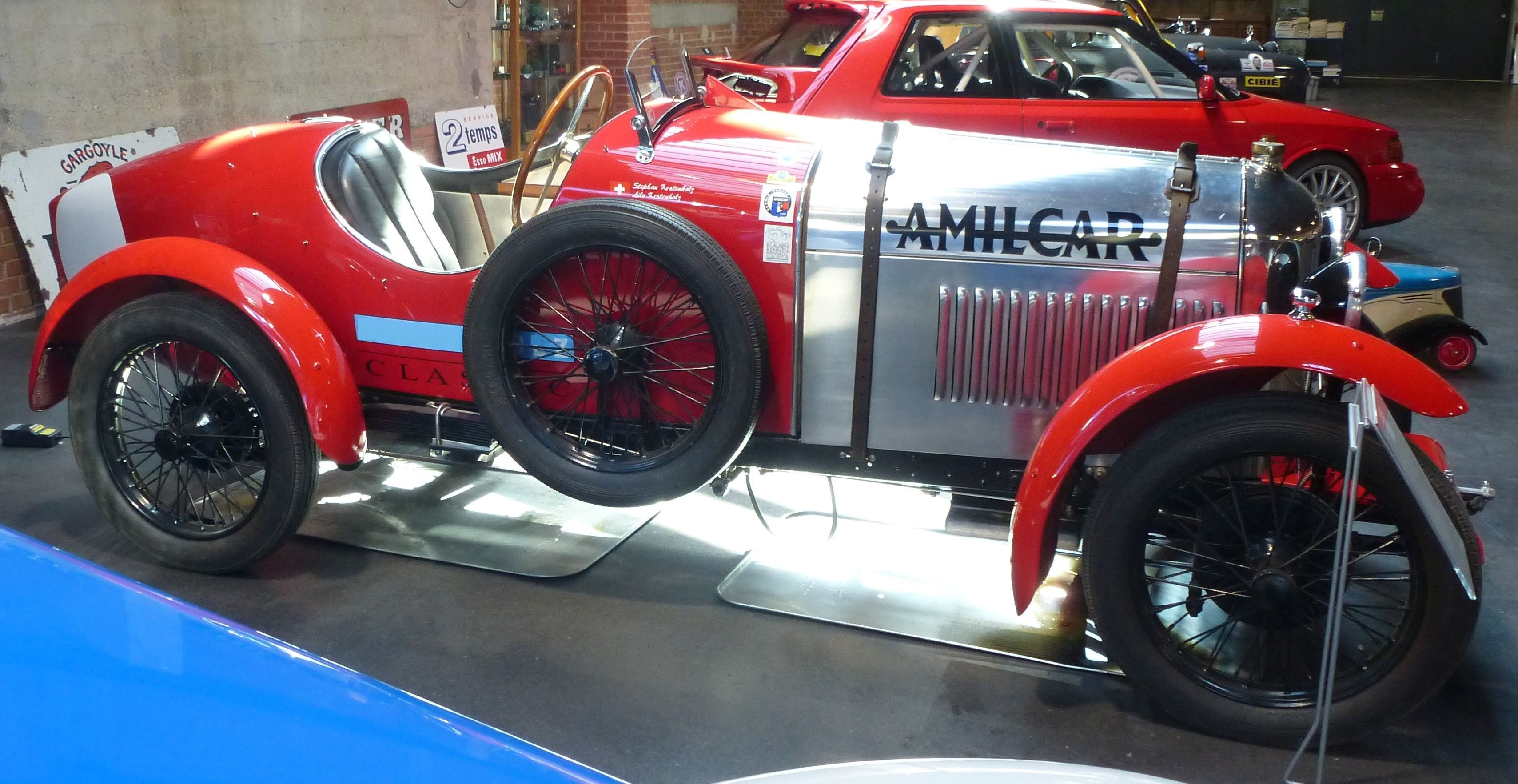 Amilcar Type CGS Roadster 1924